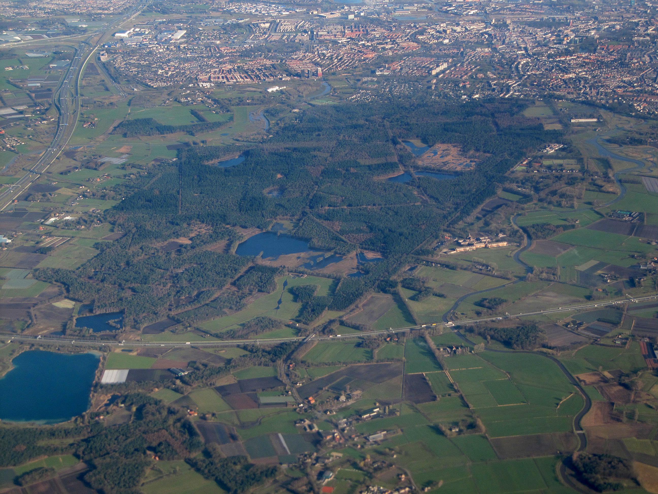 Mastbos